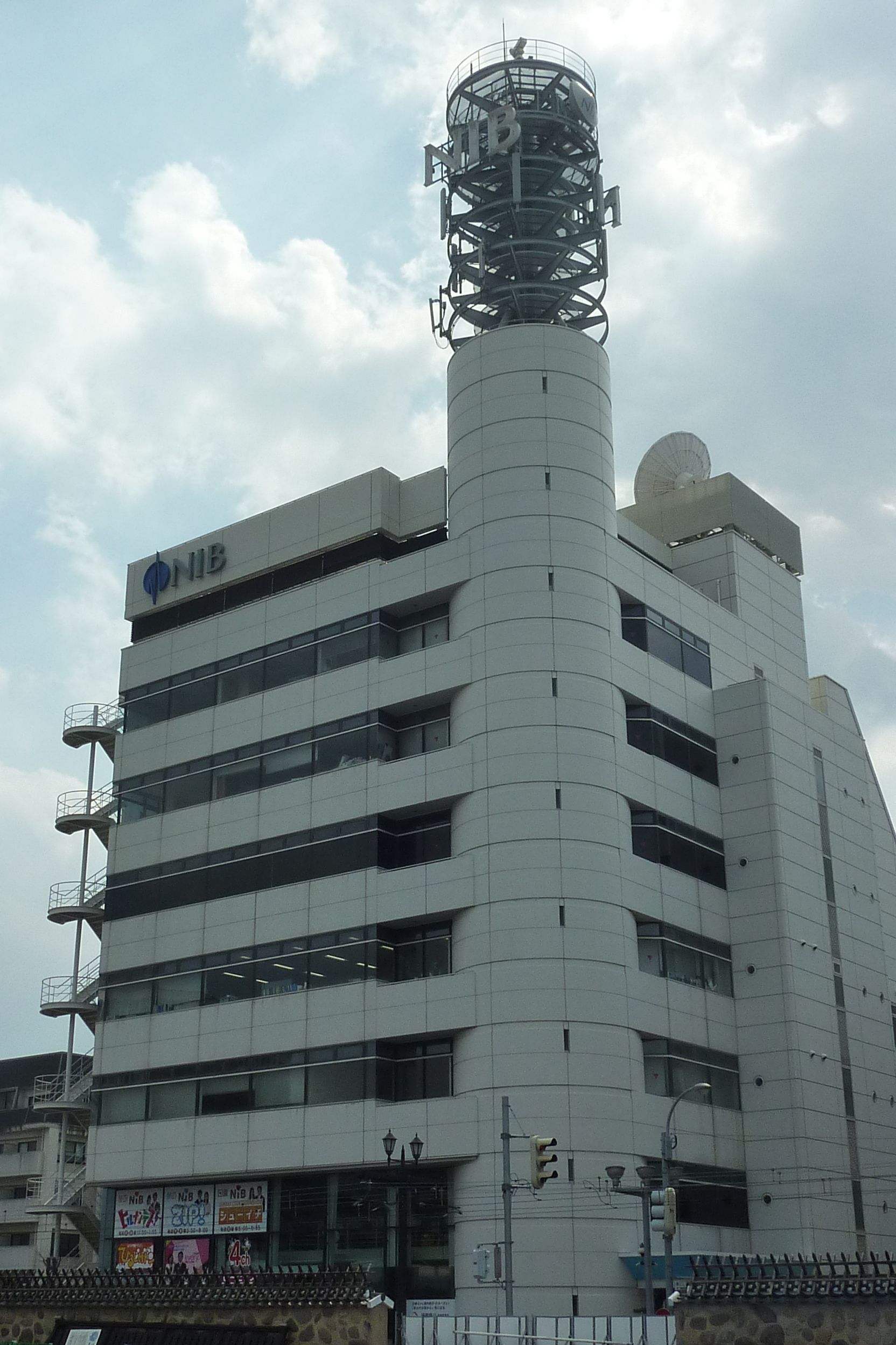 長崎国際テレビ本社ビル